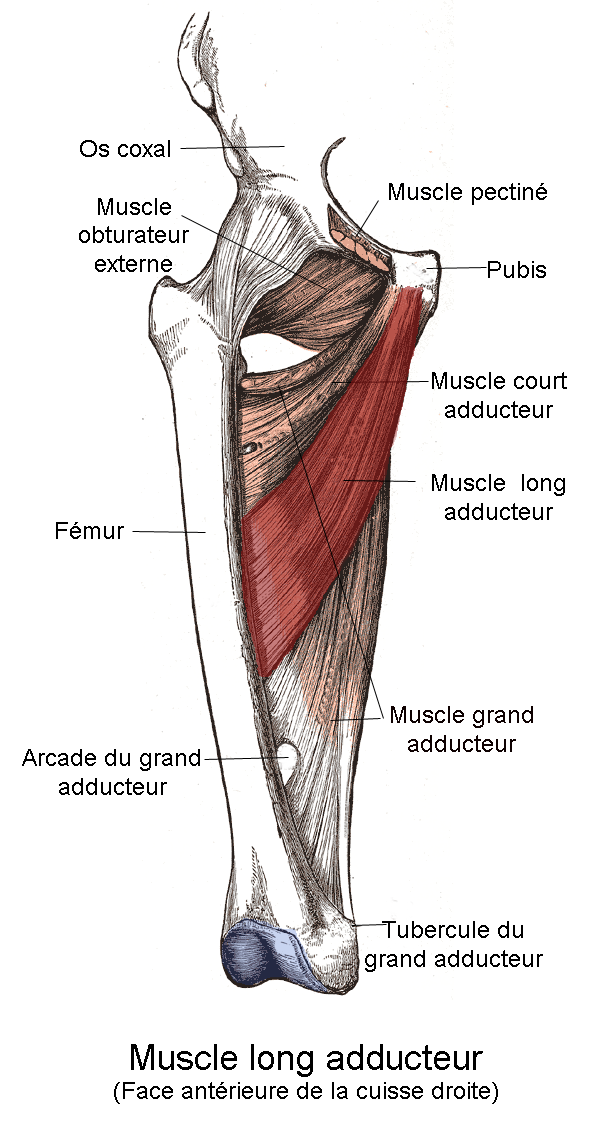 Muscle long adducteur. Anatomie humaine